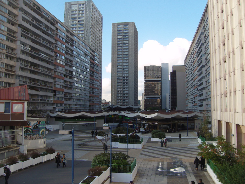 Paris 13e, dalle des Olympiades - quartier chinois, vue générale, au fond la fac de Tolbiac